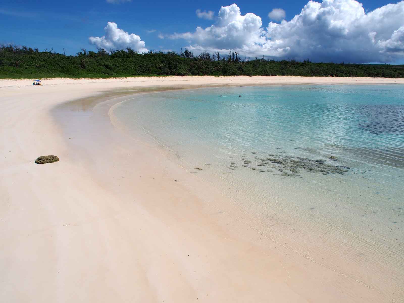 渡口の浜（沖縄県伊良部島）